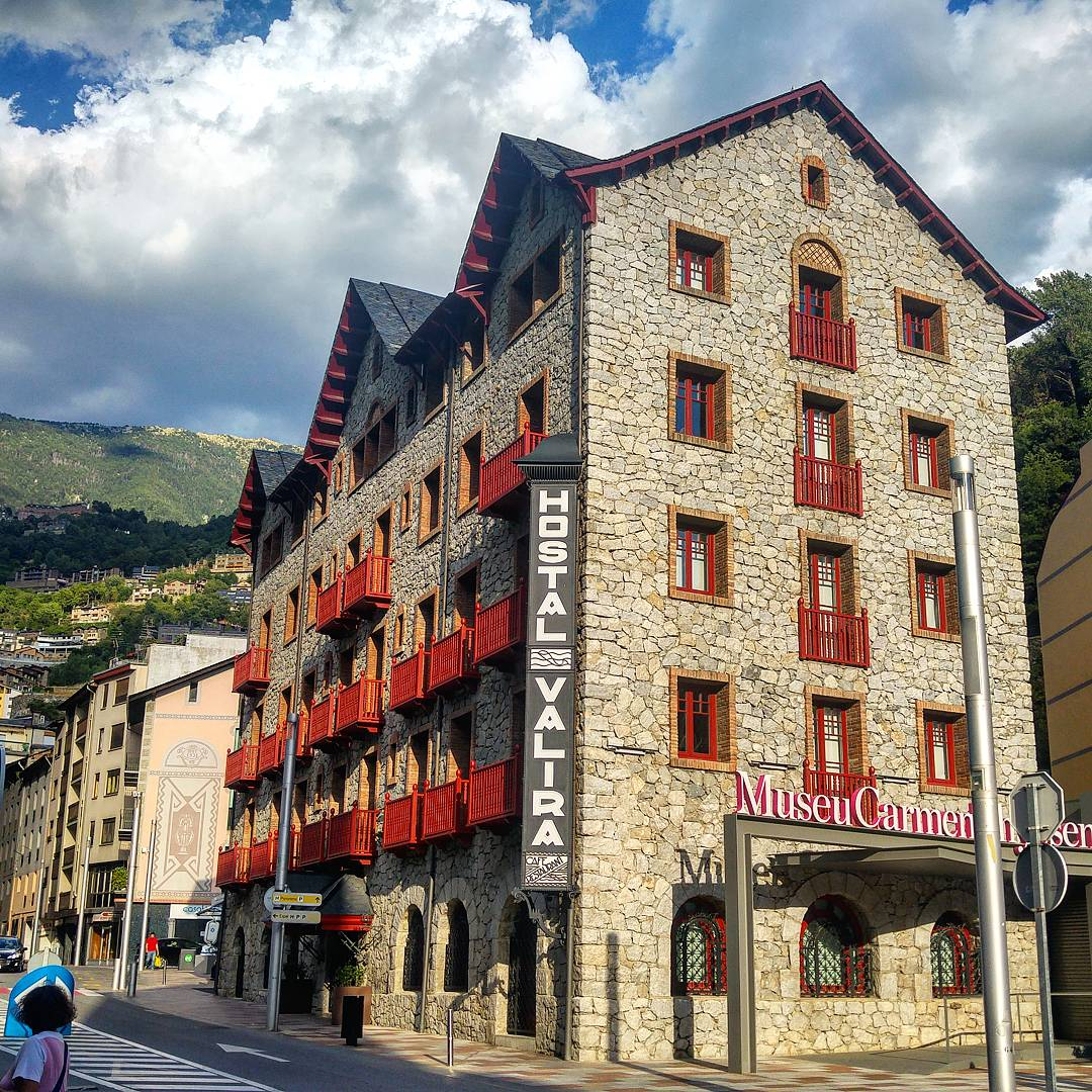 Museu Carmen Thyssen d'Escaldes, ubicat a la planta baixa de l'antic balneari Hostal Valira